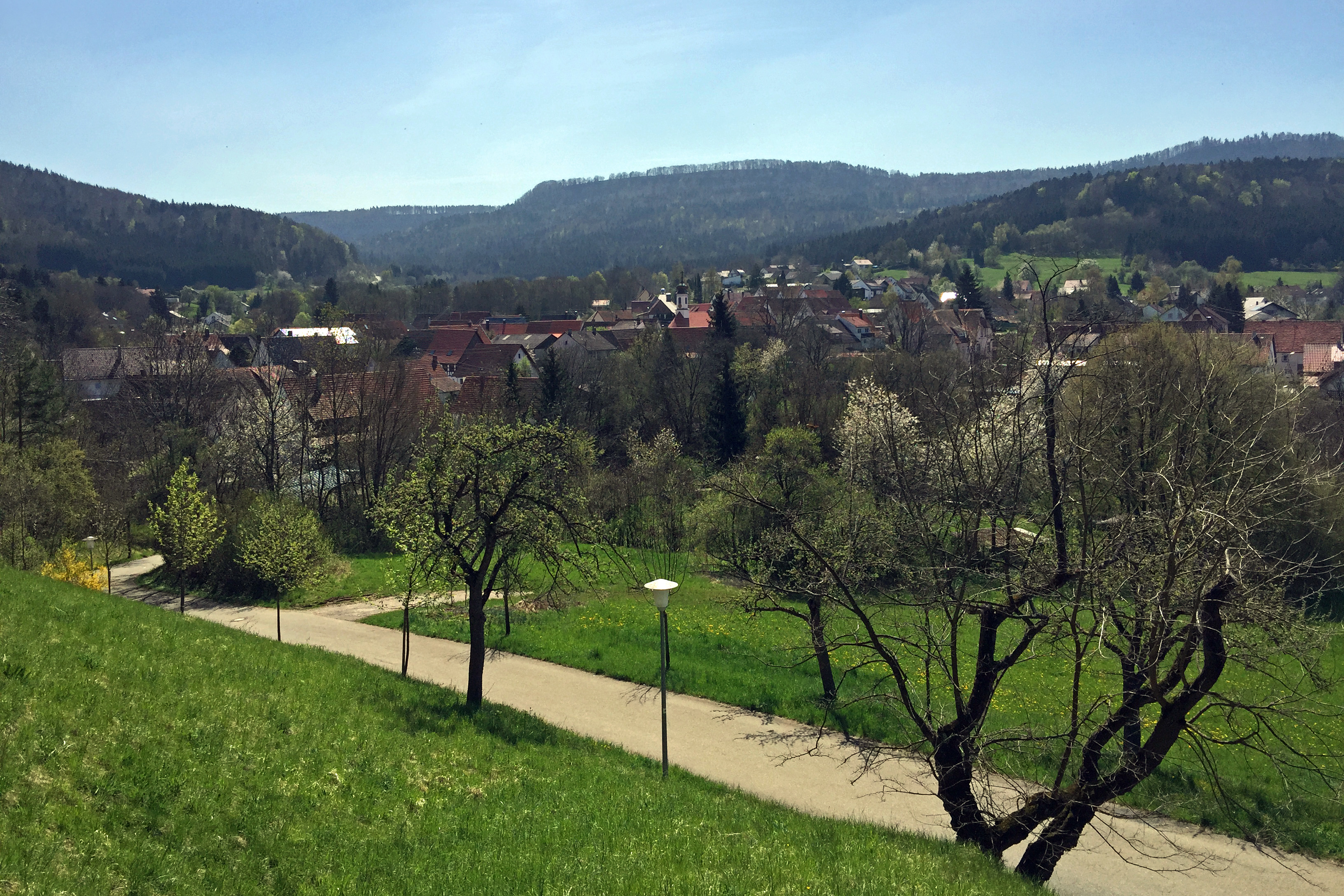 Bisingen - Thanheim